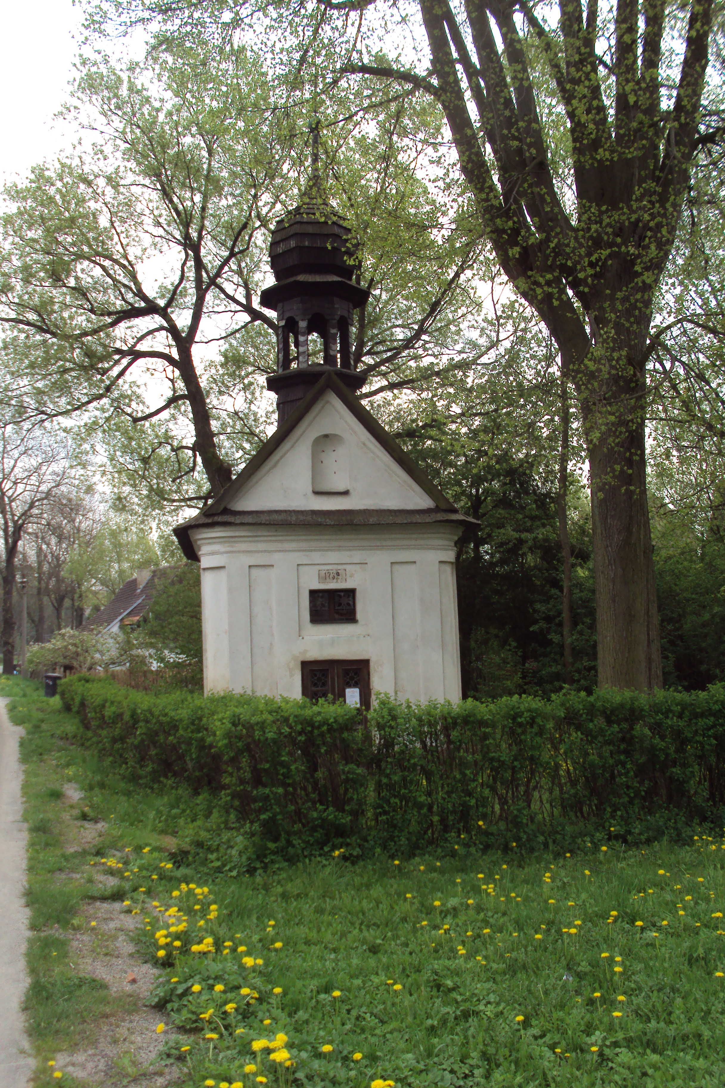 Kaplička ve vsi Luhov u Brniště